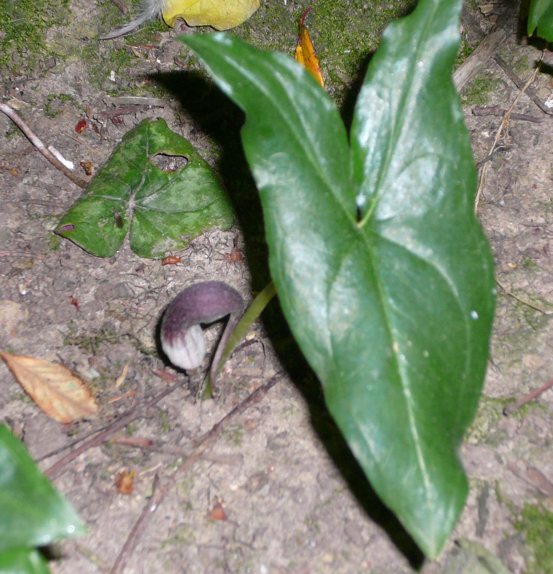 Arisarum proboscideum dans mon jardin (close-up)